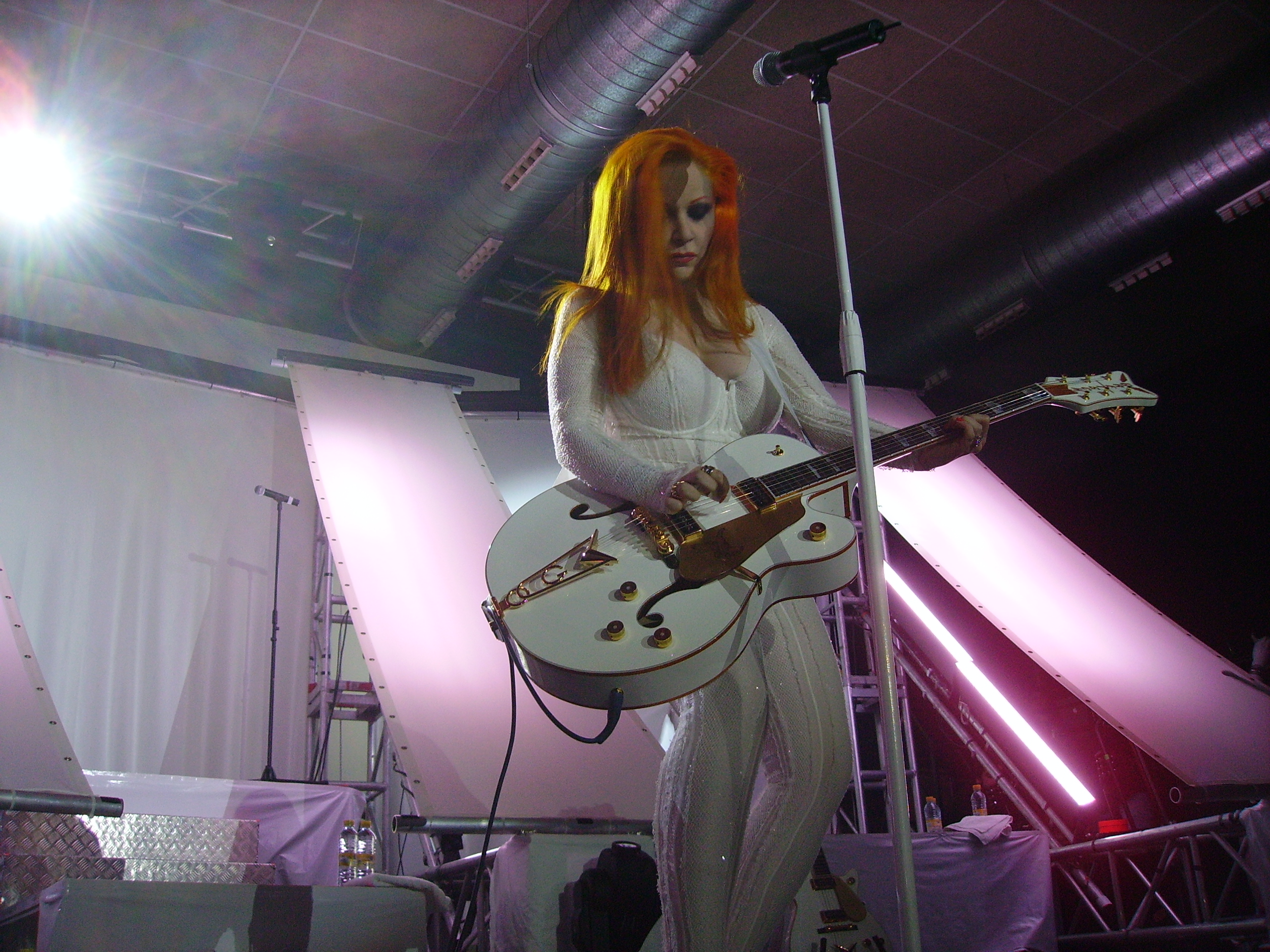 Fangoria durante su concierto en la Santana 27 para Coolpable (Bilbao, España, noviembre de 2006)